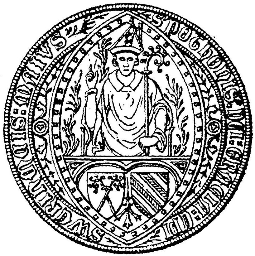 Siegel des Bischofs Potho von Pothenstein († 1390)